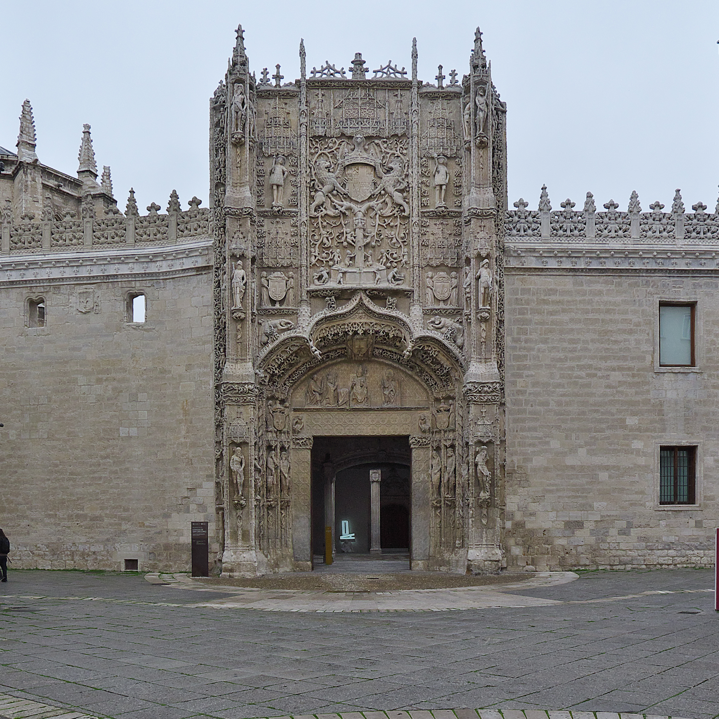 Impresionante fachada-retablo cuya autoría, actualmente, sin documentar. Su datación es posterior al 1492, año de la conquista de Granada. Apoteosis a unidad política de España, contribución del dominico Alonso de Burgos, confesor de Isabel la Católica, a los Reyes Católicos. Simón de Colonia, Juan Guás y hasta Enrique Egas han recibido su atribución. Por analogía con la obra de Gil de Siloé, que trabajó en otras obras del Colegio, este maestro recibe la autoría de la obra, destacada en el gótico hispano flamenco.